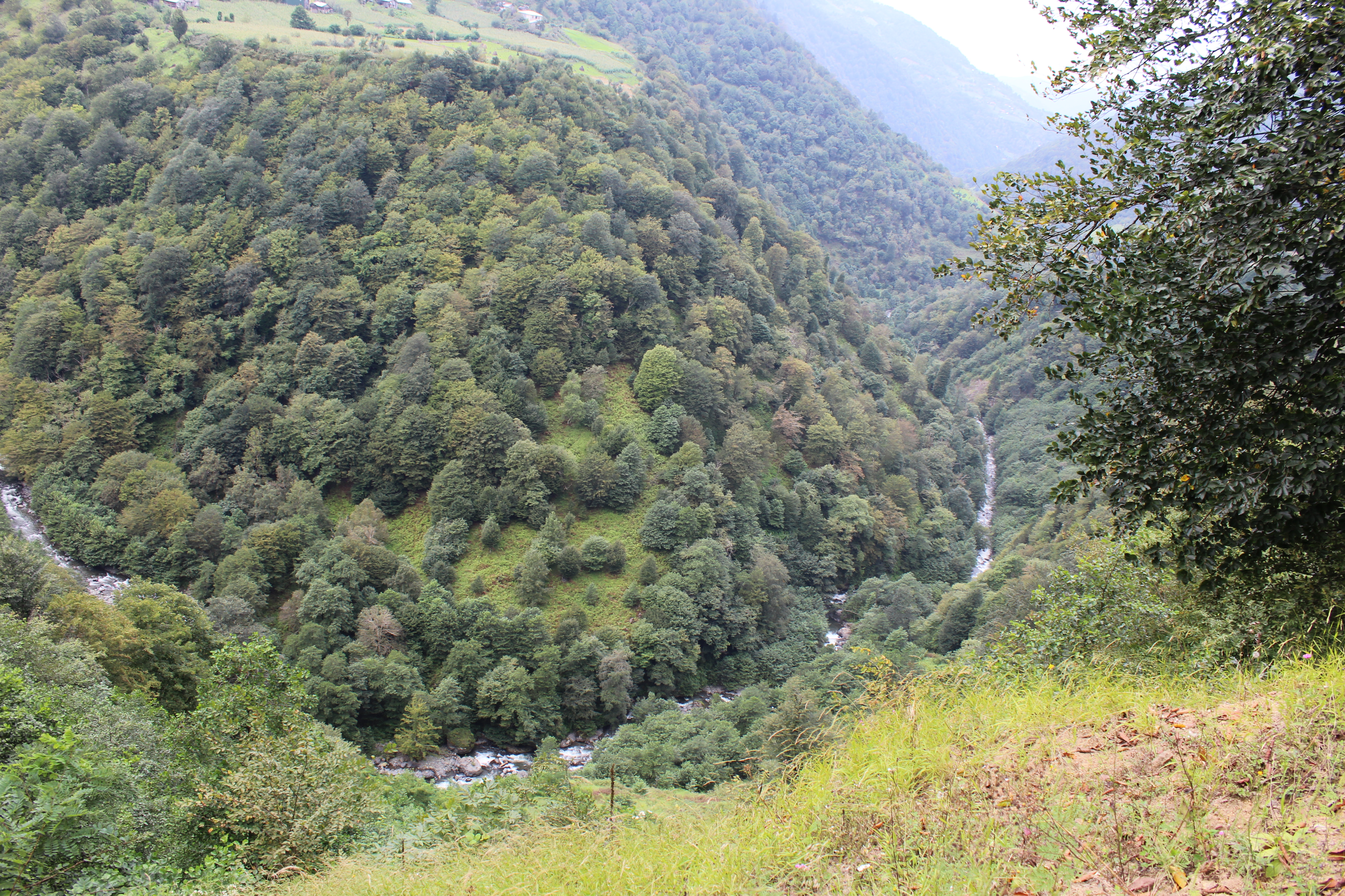 მდინარე გუბაზეული სოფელ ზოტთან